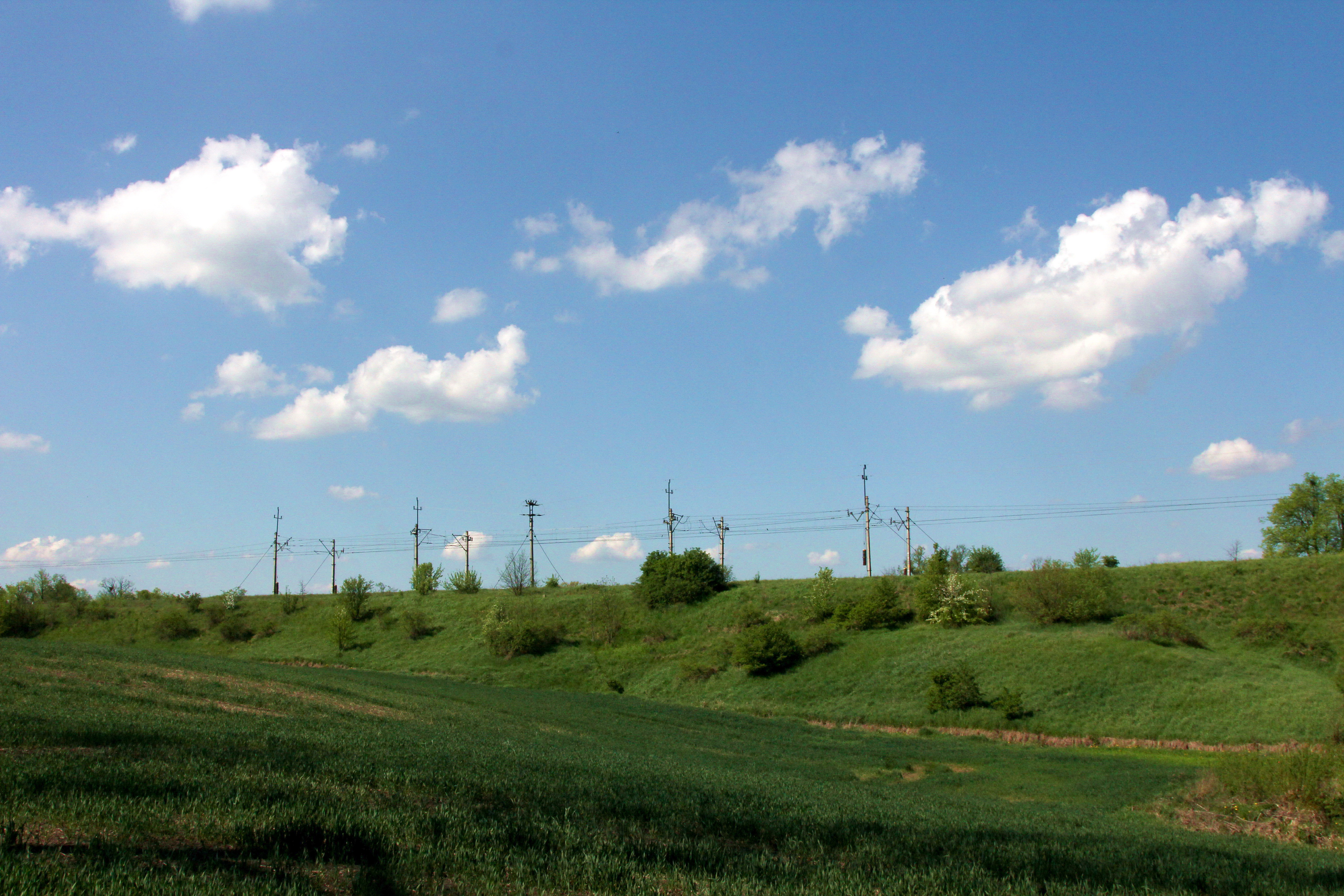 Nasyp kolejowy w miejscowości Sątopy-Samulewo. (Linia kolejowa Olsztyn - Korsze)